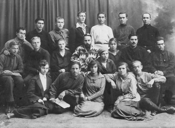 Профессор палеонтологии Д. В. Наливкин (в центре в узбекском халате) с группой студентов горно-геологическое отделения Физико-математического факультета САГУ. В заднем ряду третий слева Владимир Попов, будущий академик УзССР, четвёртый слева Константин Соколов. Ташкент, 1926 год.